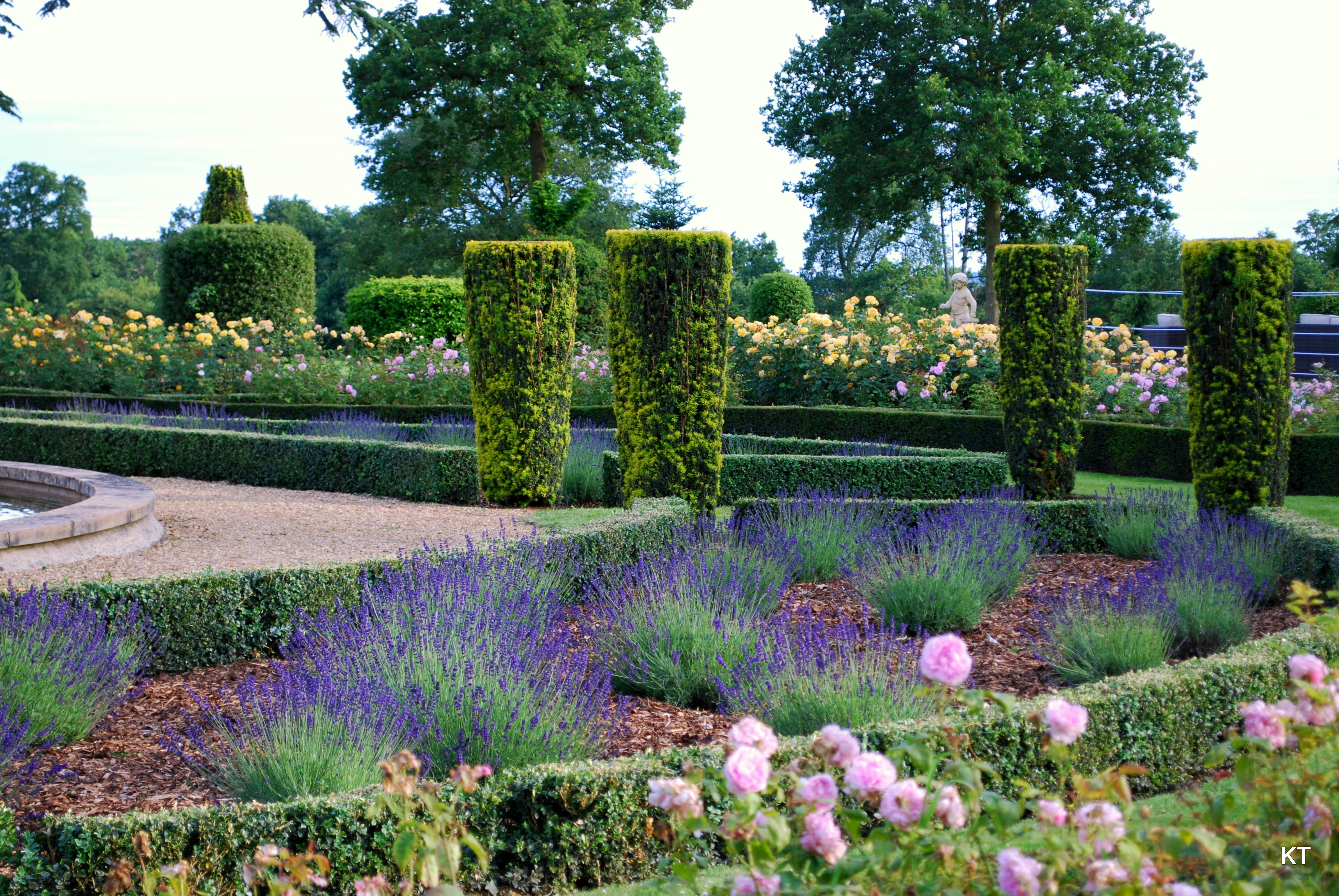 June 2011